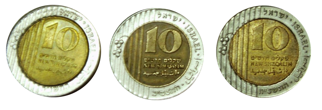 שלושה מטבעות של 10 שקלים. המטבע השמאלי הוא זיוף גרוע. האמצעי הוא זיוף שנראה כמו המקור אבל שוקל מעט יותר. הימני הוא מטבע אמיתי.